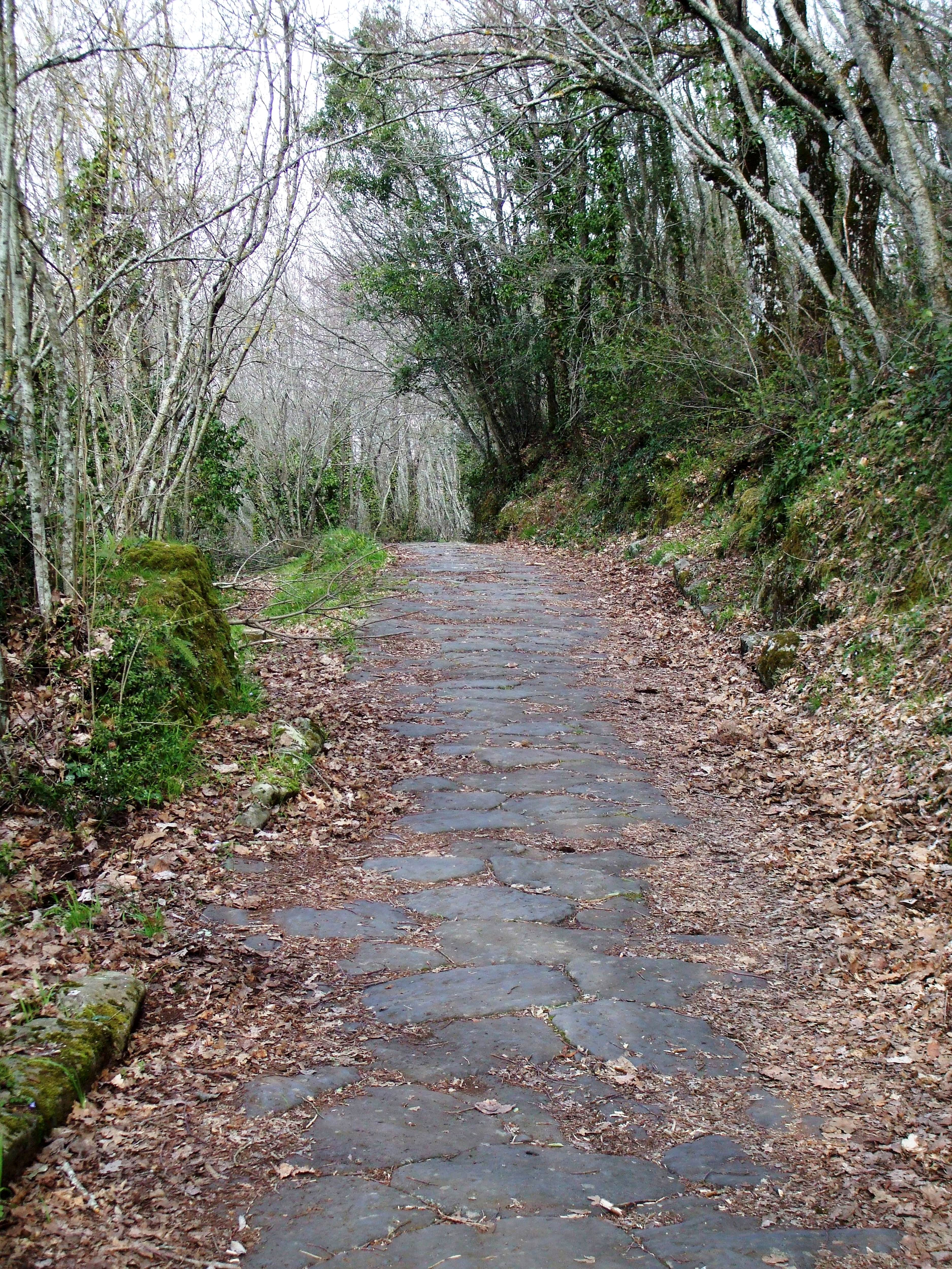 Monte Cavo - la via Sacra o Trionfale